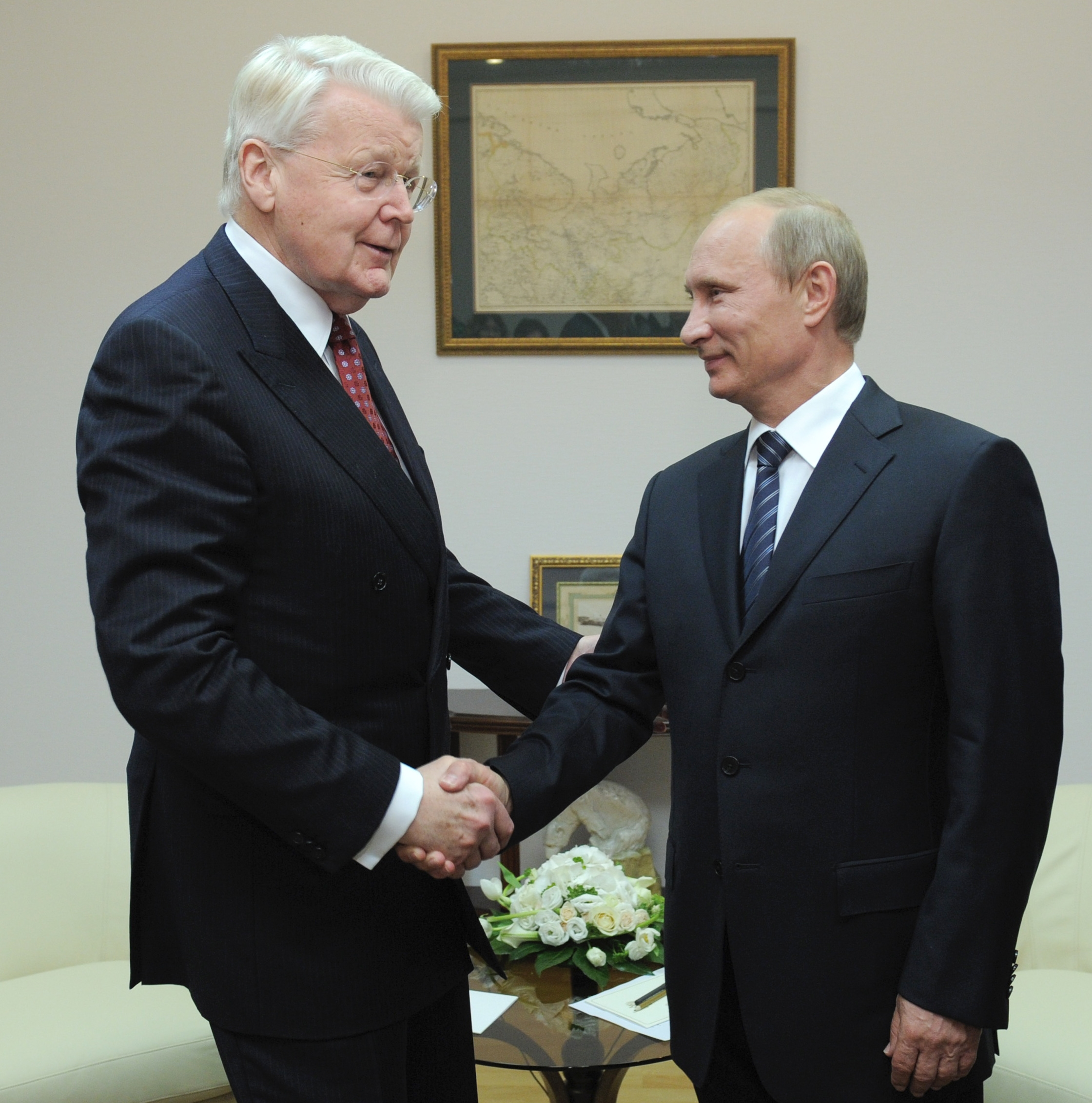 Встреча Председателя Правительства РФ Владимира Путина и Президента Исландии Олафа Рагнара Гримссона в рамках Международного арктического форума в Архангельске